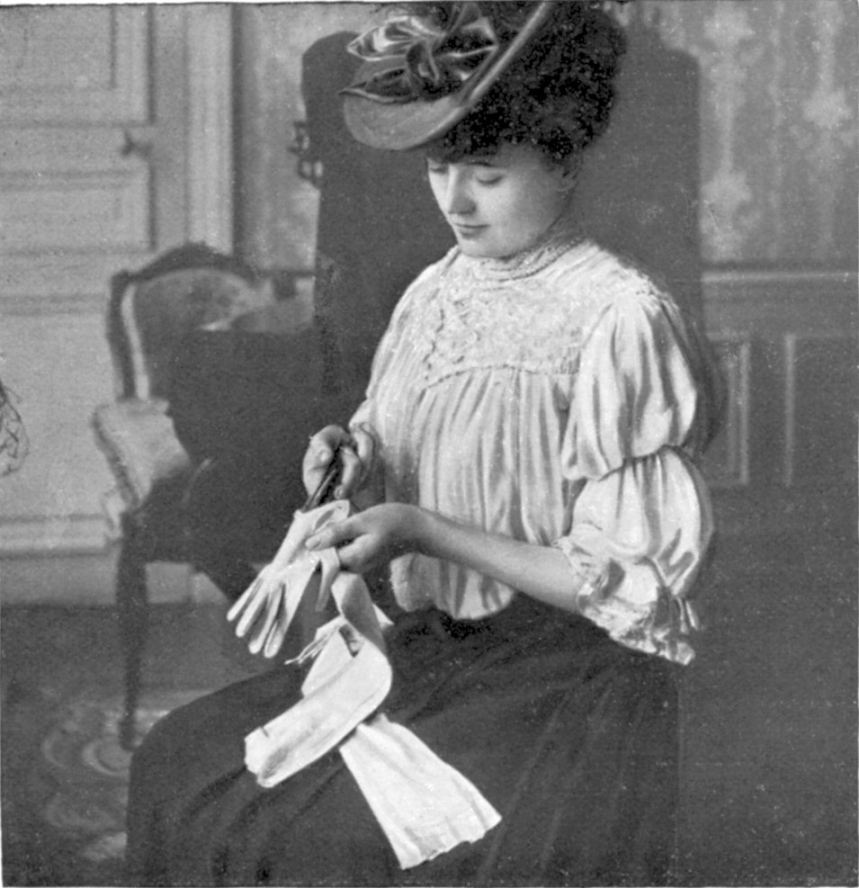 LES BAGUETTES. Introduire délicatement les baguettes et ouvrir avec précaution, très peu, les doigts.